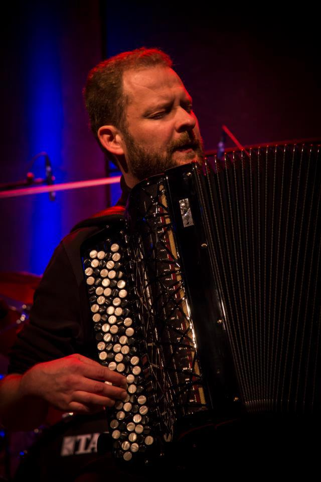 Konsert Kungsbacka 2012